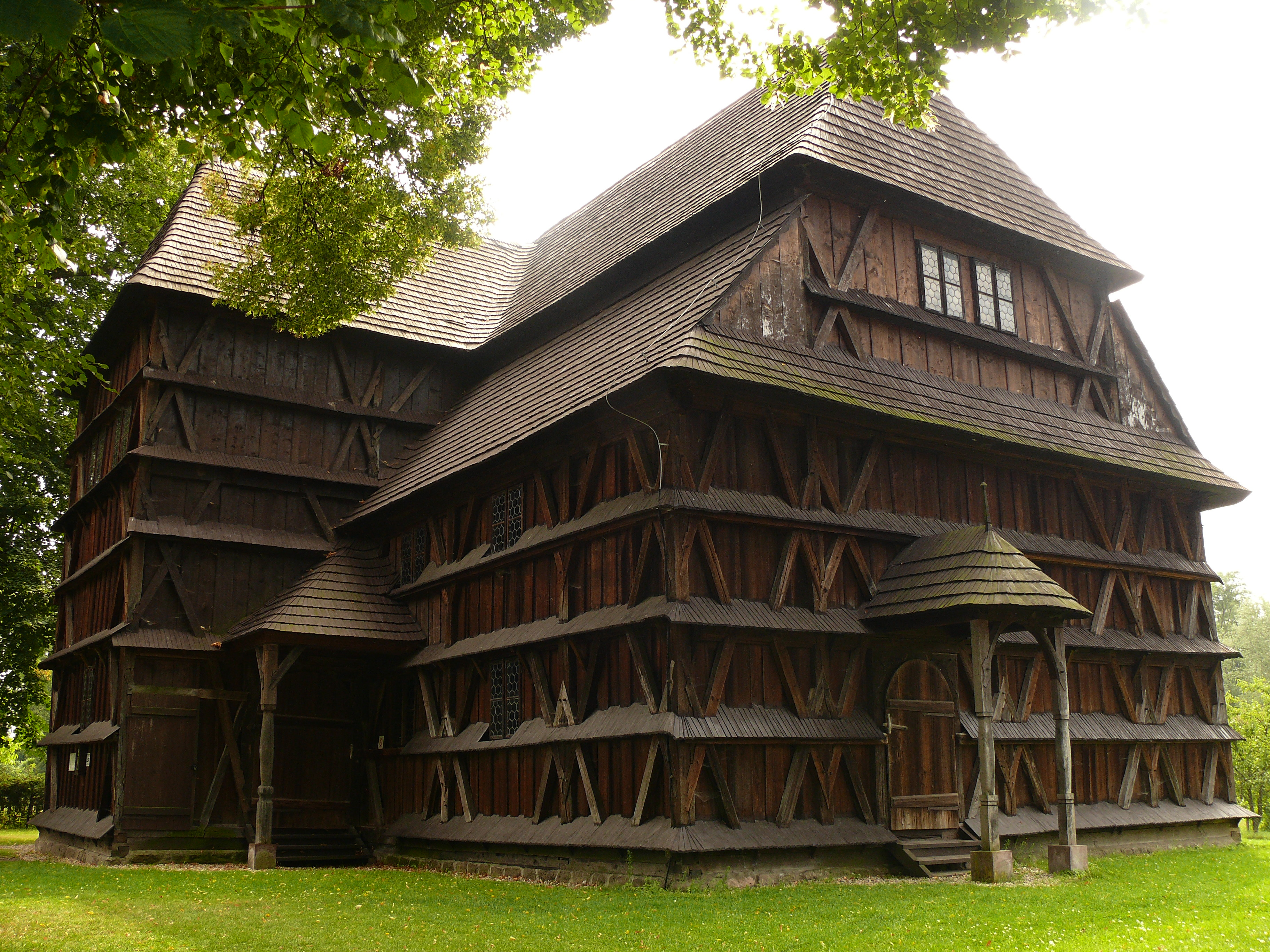 Drevený kostolík v Hronseku This medium shows the protected monument with the number 601-51/1 in the Slovak Republic.